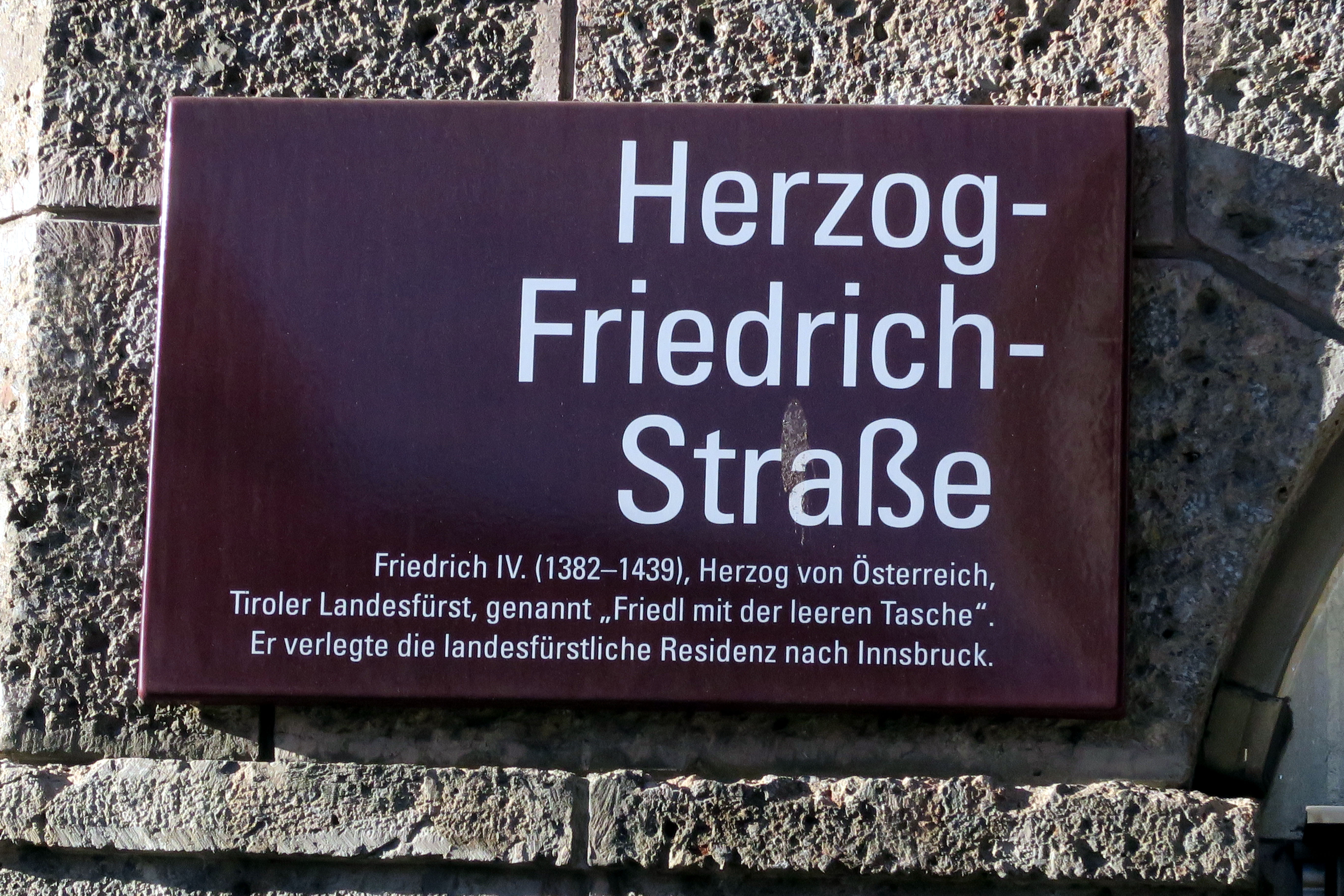 Schild mit Beschreibung der Herzog-Friedrich-Straße in Innsbruck